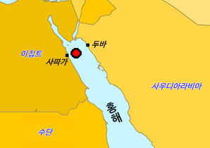 알 살람 보카치오 98호 침몰 지점